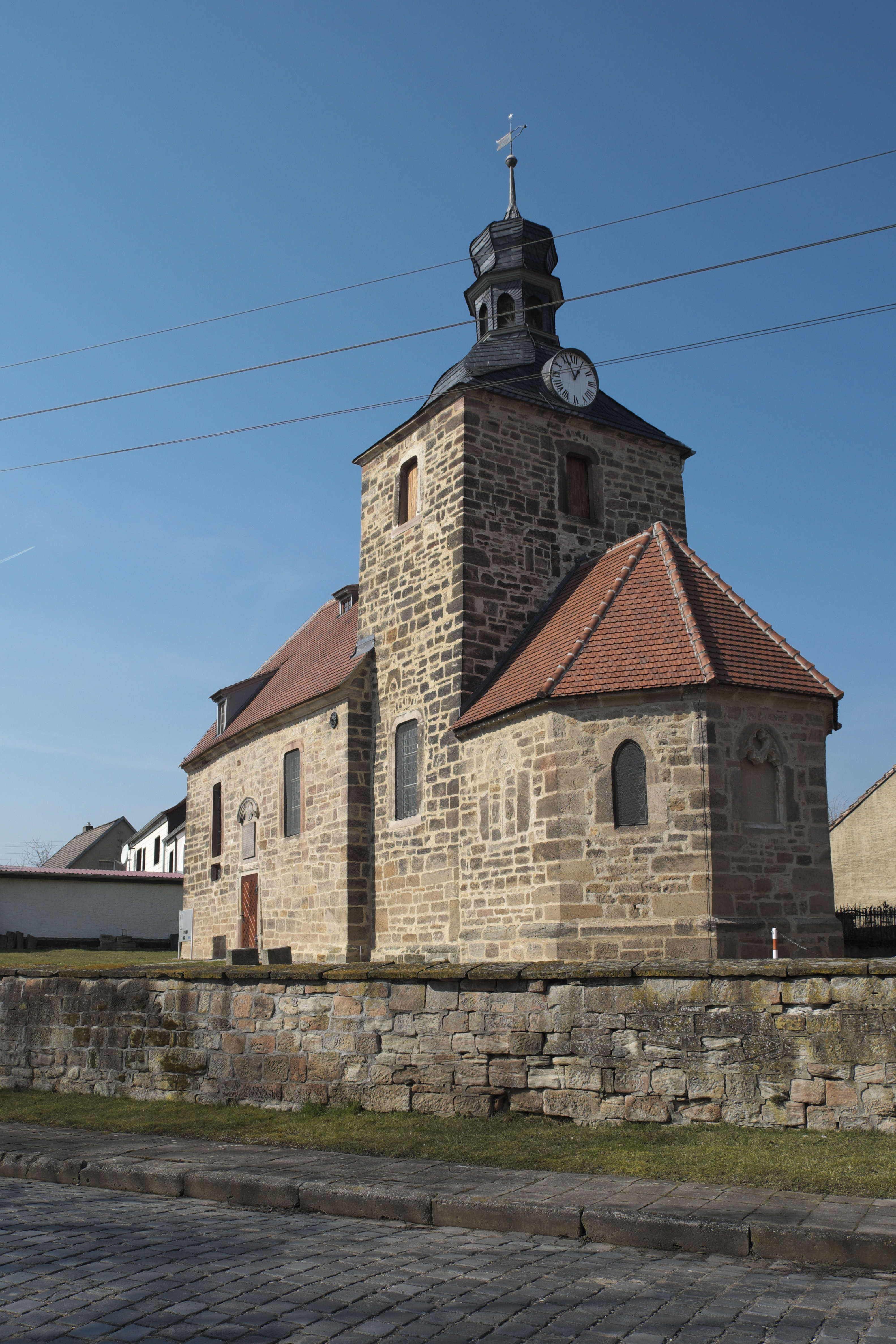 Kirche St. Michaelis in Grockstädt, einem Stadtteil von Querfurt im Saalekreis in Sachsen-Anhalt/Deutschland